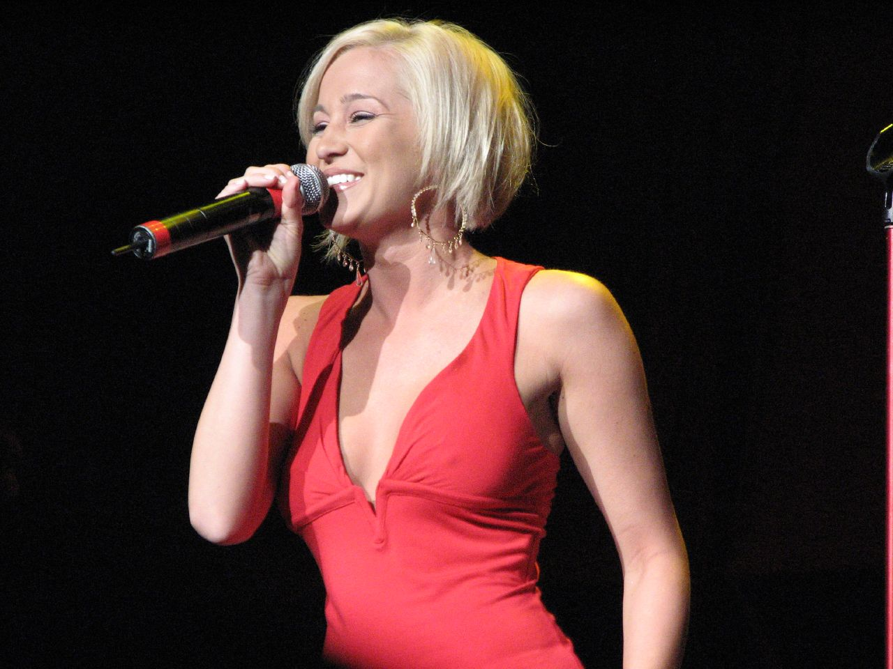 Kellie Pickler singing